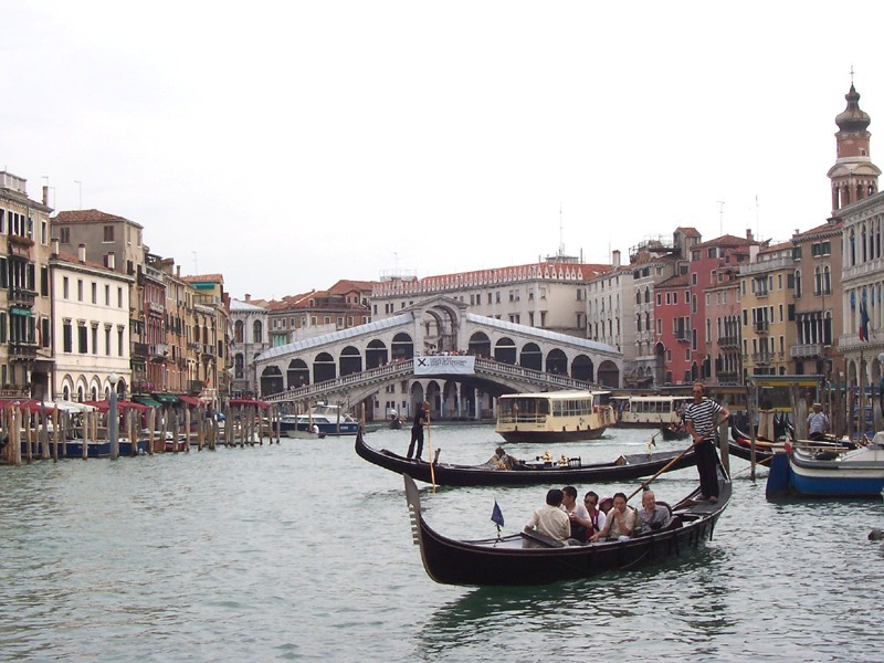 Venezia - Canal Grande e il Ponte di Rialto